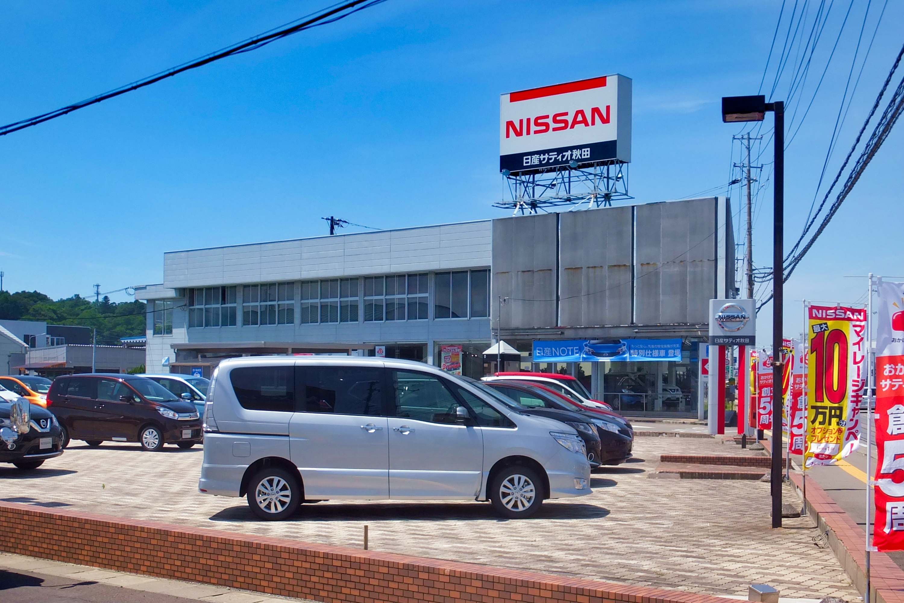 日産サティオ秋田（秋田市寺内字イサノ、秋田県道56号秋田天王線沿い）